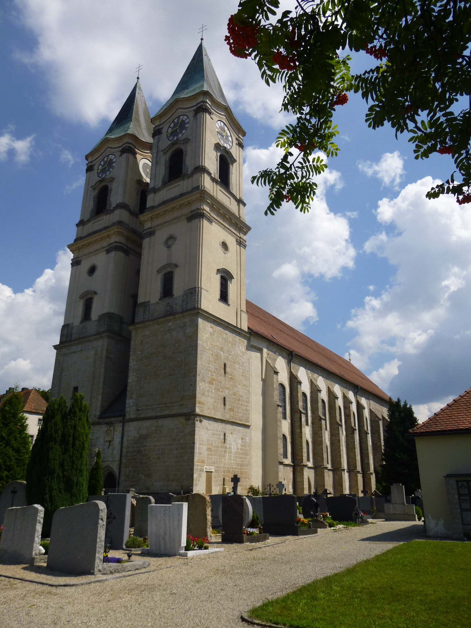 Blick auf die Abtei und Pfarrkirche St. Mauritius in Niederalteich. Die Kirche ist vom Friedhof umgeheben und gehört zum Benediktiner Kloster.This is a photograph of an architectural monument.